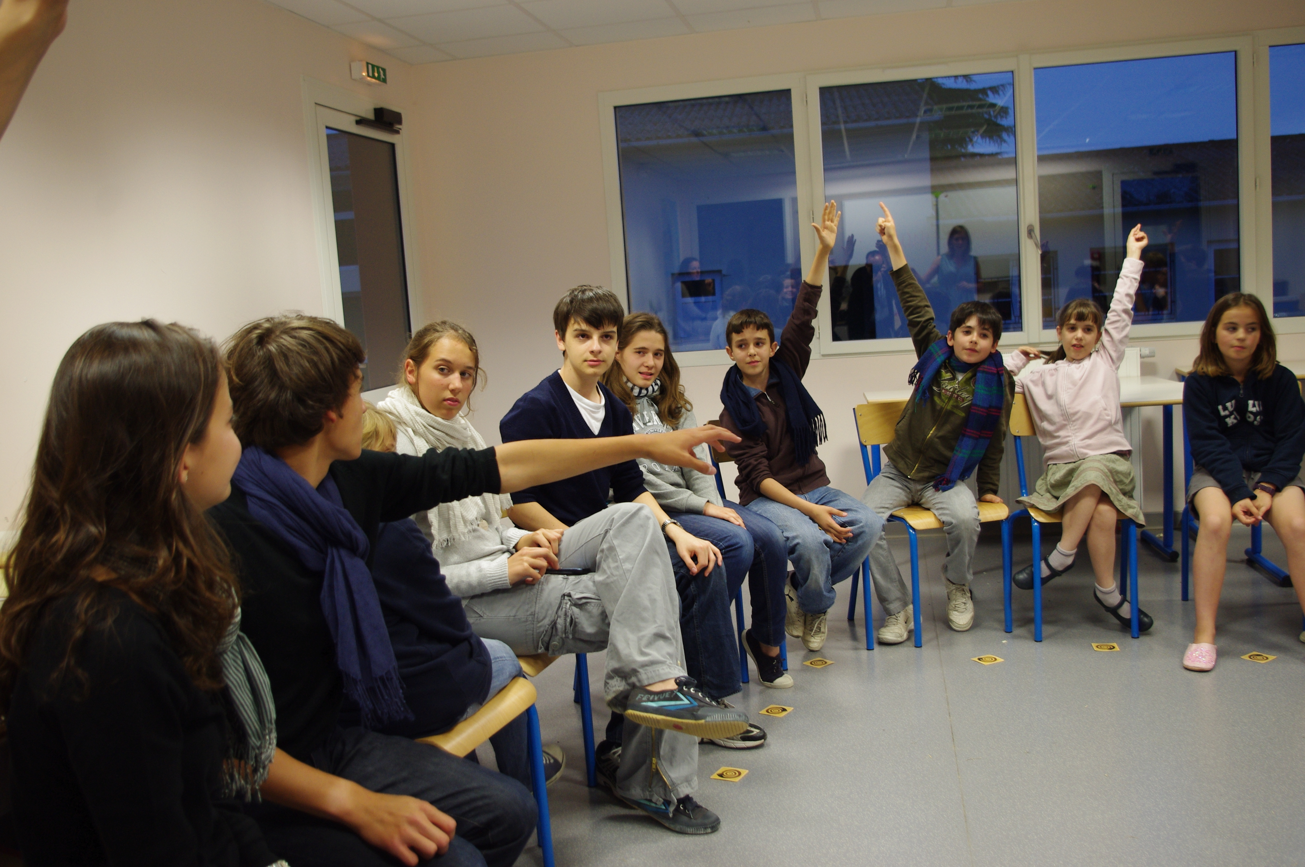 Les Petits Chanteurs de Passy jouent aux Loups-Garous de Thiercelieux - un jeu de société.